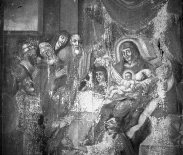 Нараджэнне Яна Хрысціцеля. ХVІІІ ст. З в. Вялікія Сяхновічы. Брэсцкая вобл. МСБК ІМЭФ НАН Беларусі